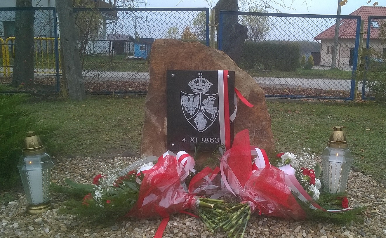 Tablica pamiątkowa zrealizowana w ramach pomysłu pt. "Ślady Powstania"